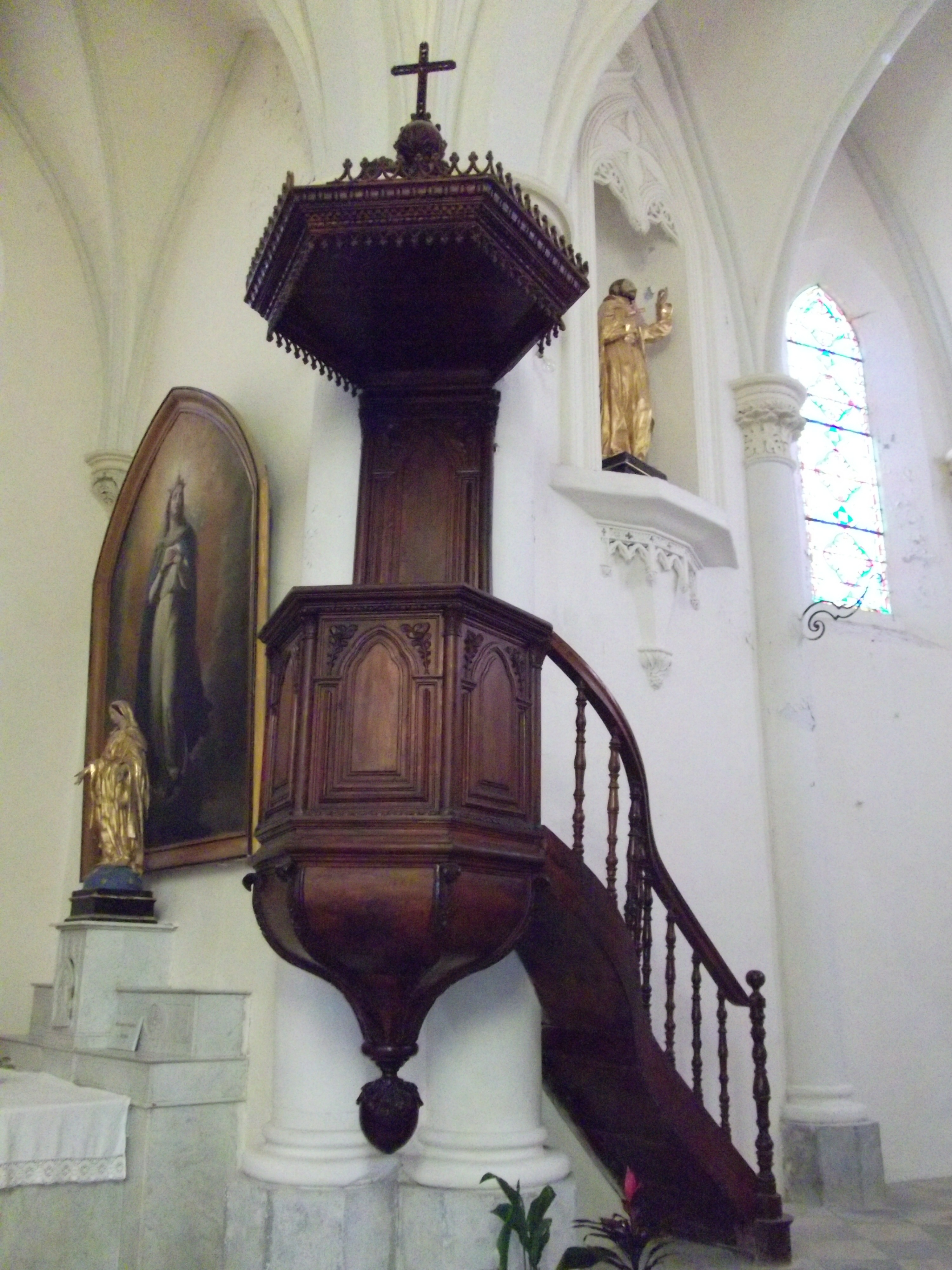 Chaire de l'église de Saint-Andéol-de-Berg (Ardèche - France)